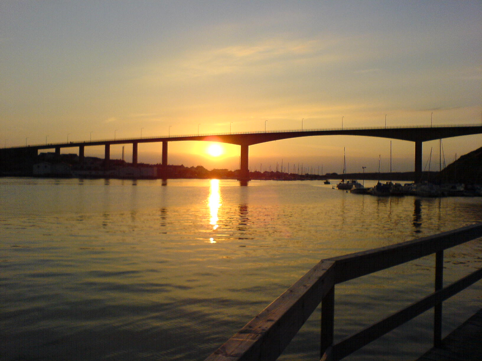 Smögen bridge in sunset.